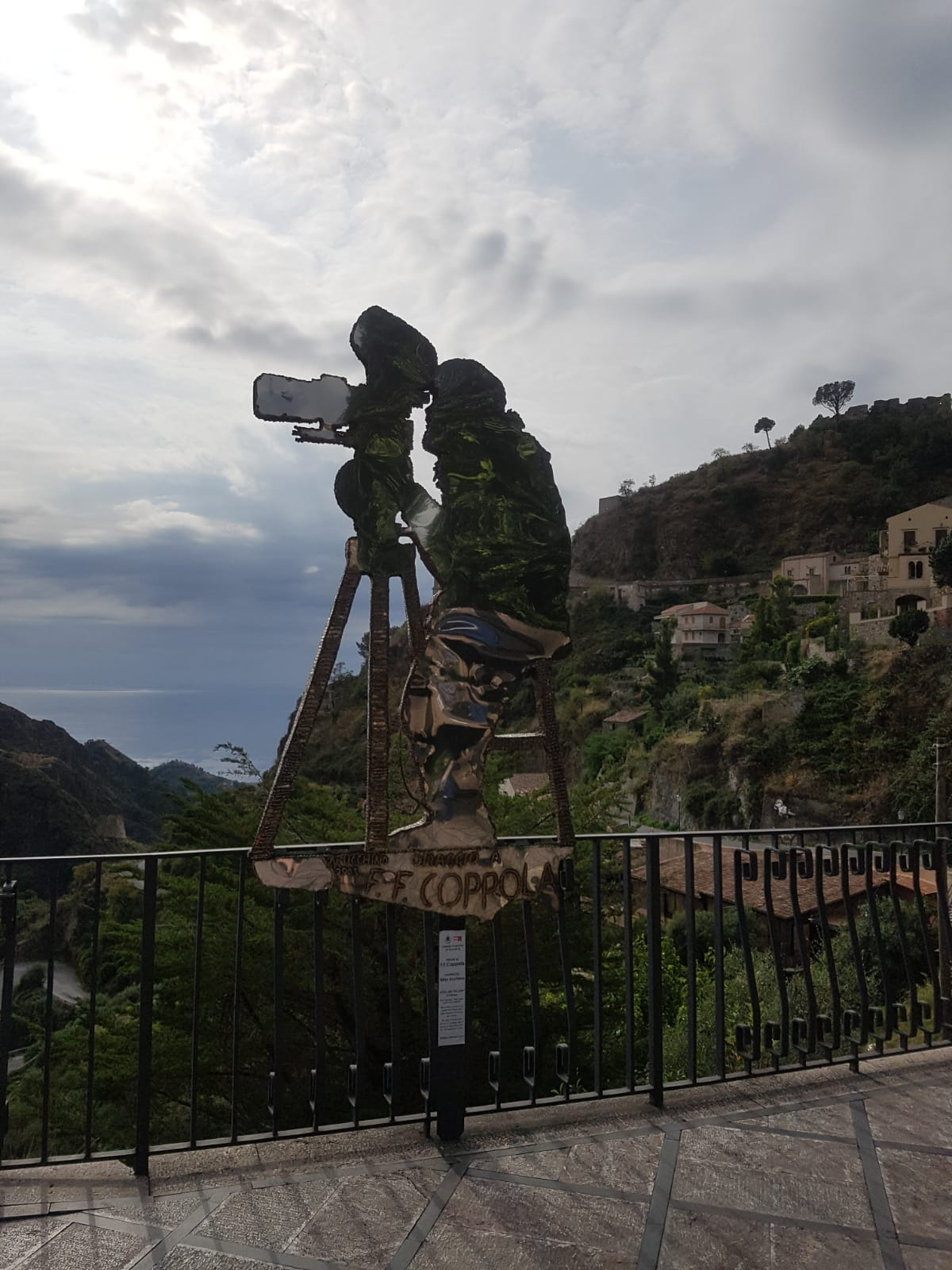 פסל לכבודו של פרנסיס פורד קופולה בסבוקה בסיציליה